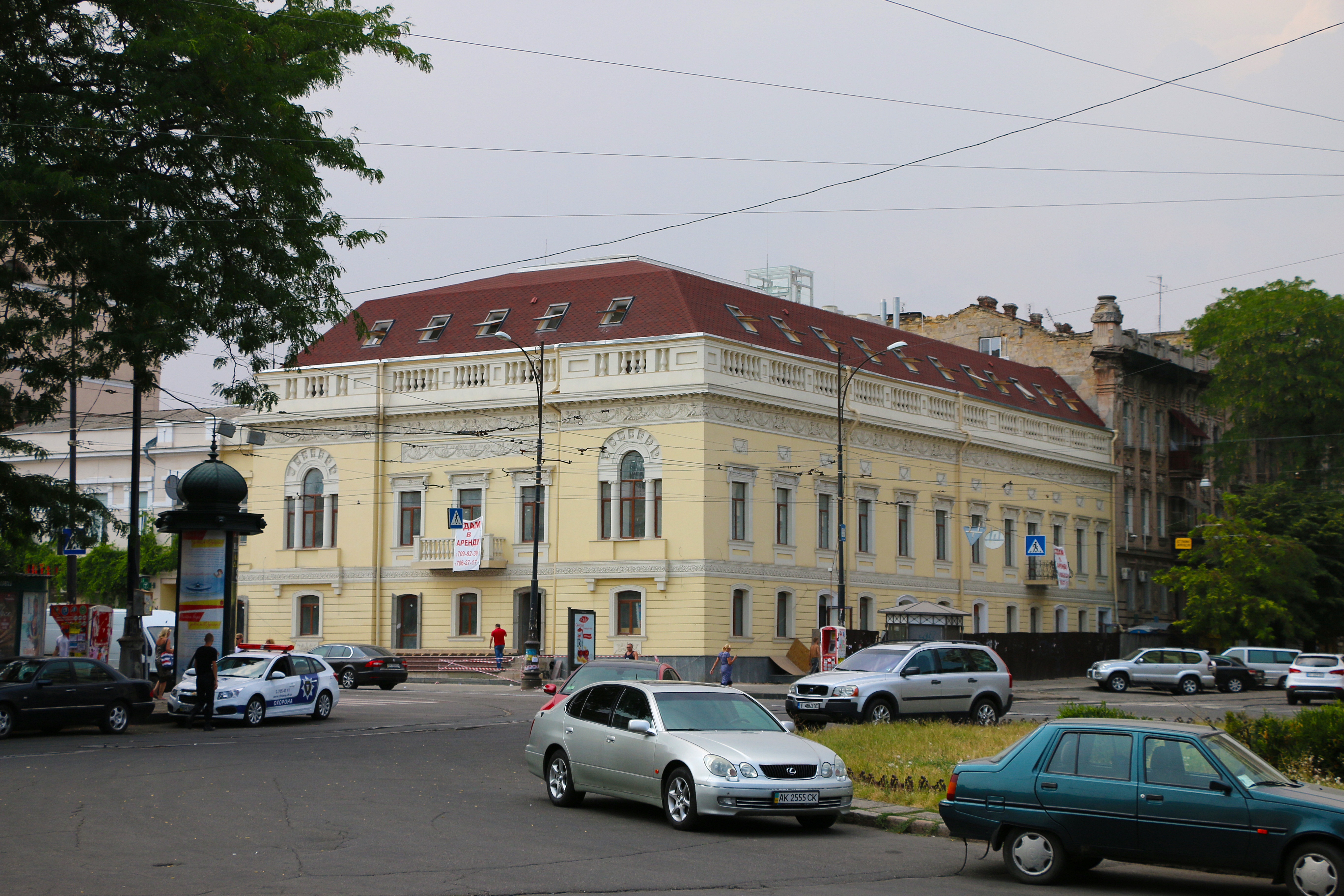 Палац Камо, Одеса, вул. Тираспольська, 4, ріг Ніжинської